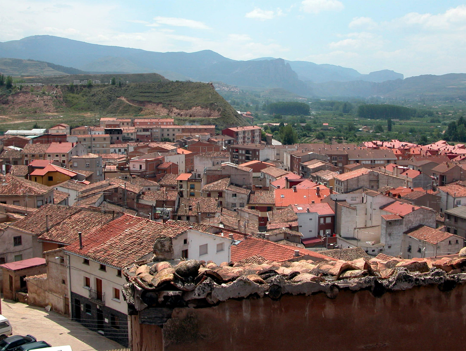 Vista general de Albelda de Iregua, puerta de entrada al Camero Nuevo.